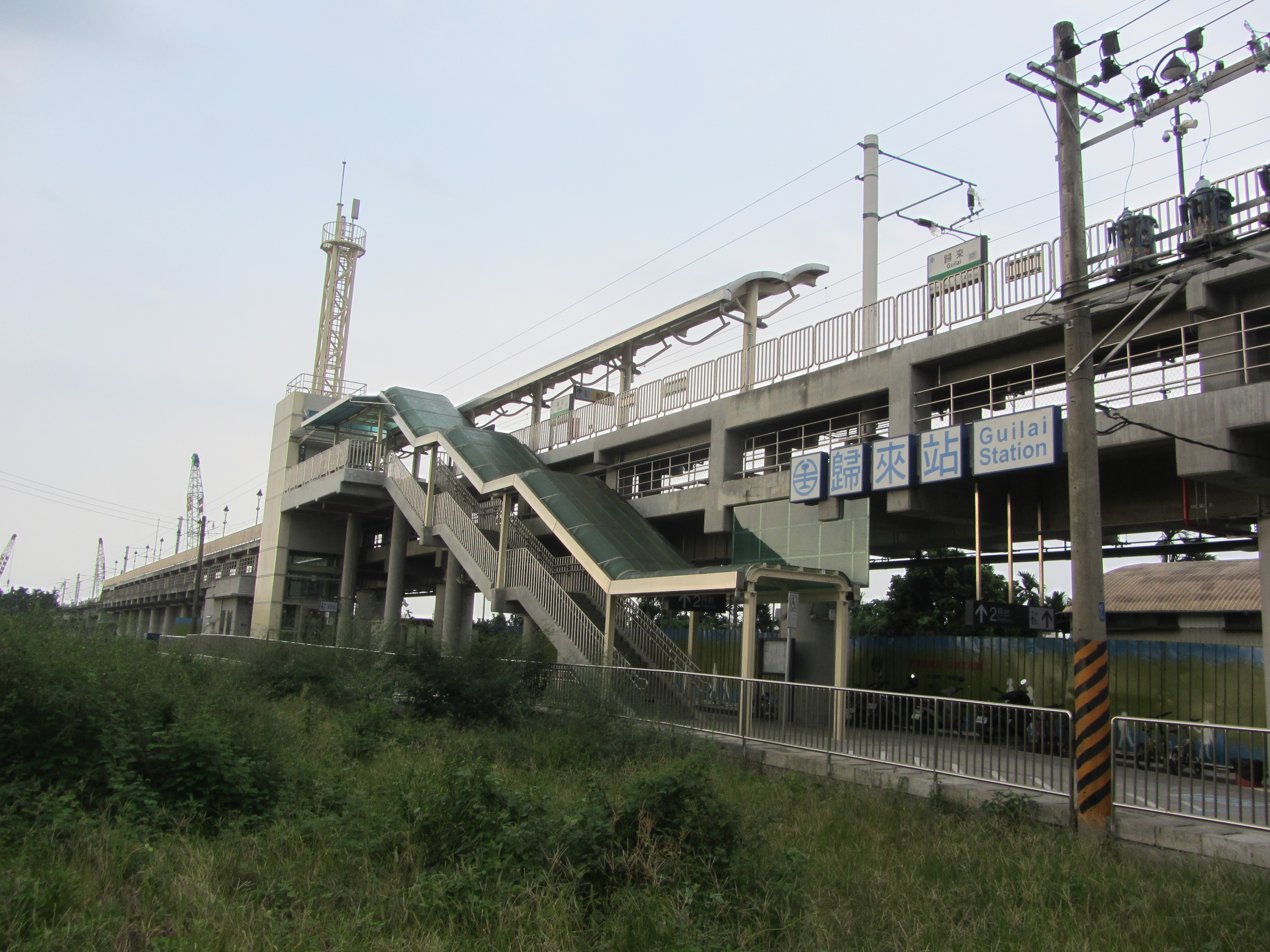 2013年6月25日啟用的高架歸來車站。